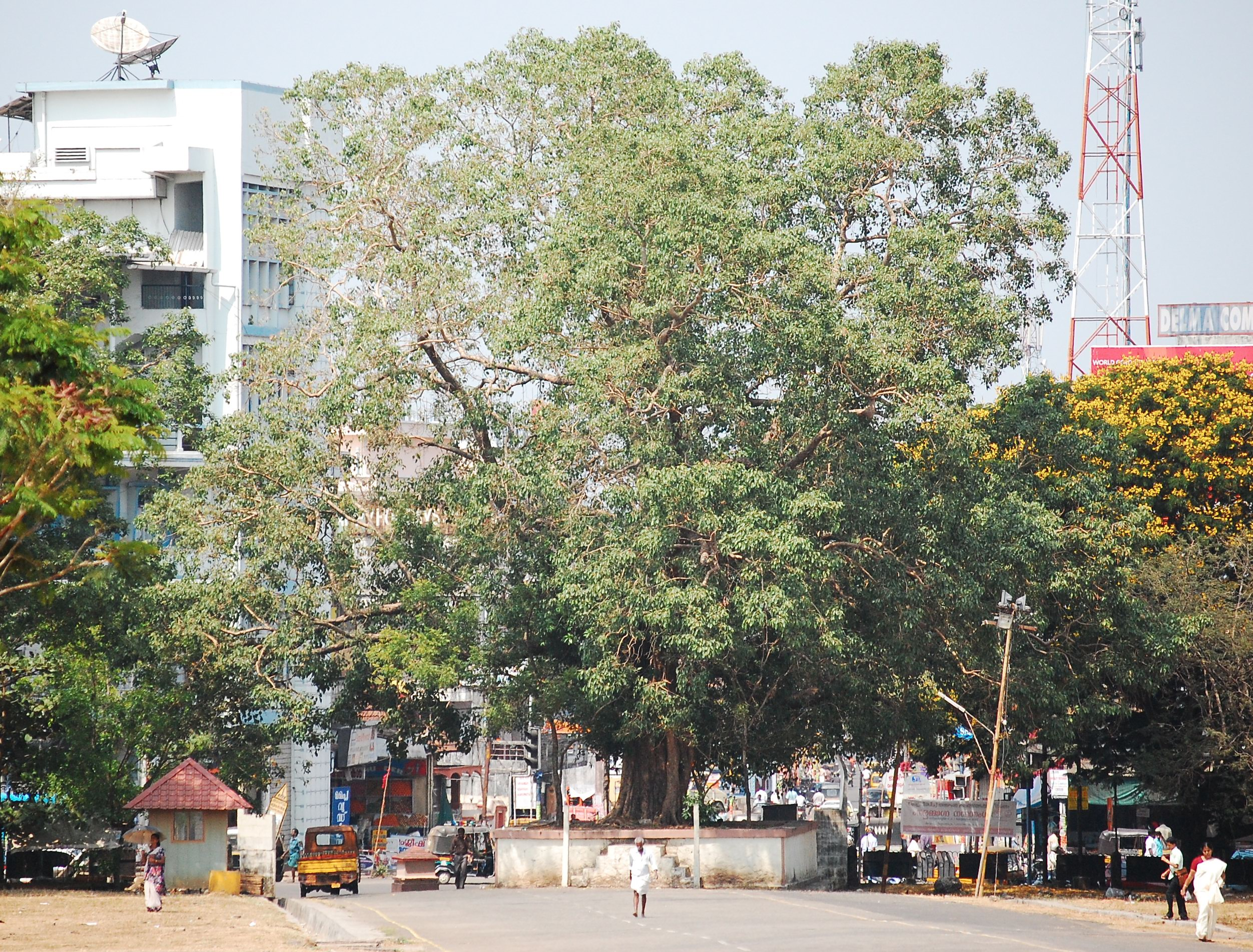 നായ്ക്കൻ-ആൽ-തൃശ്ശൂർ